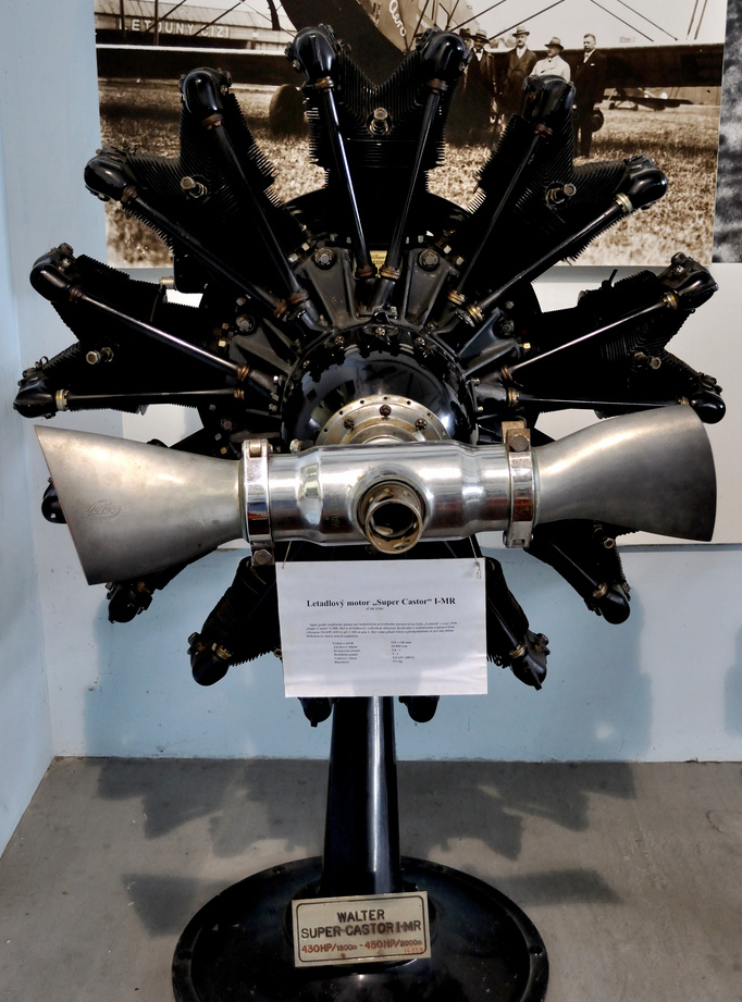 letecký motor Walter Super Castor I-MR (1936)